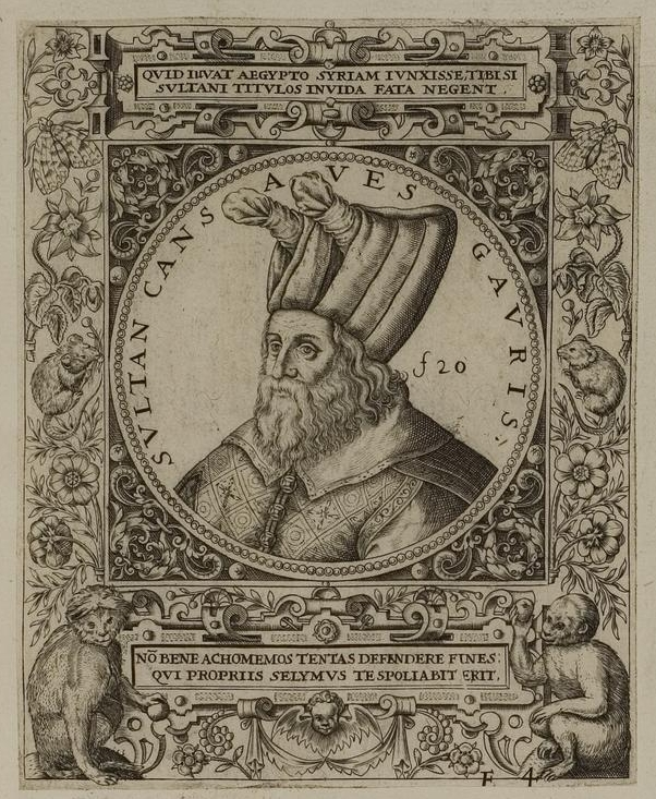 Grafik aus dem Klebeband Nr. 1 der Fürstlich Waldeckschen Hofbibliothek Arolsen Illustration aus: Georg Greblinger: Wahre Abbildungen der Türckischen Kayser vnd Persischen Fürsten / so wol auch anderer Helden und Heldinnen von dem Osman / biß auf den andern Mahomet. Johann Ammon, Frankfurt 1648 Motiv: "Sultan Cansaves Gauris" (Kansu Gavri)